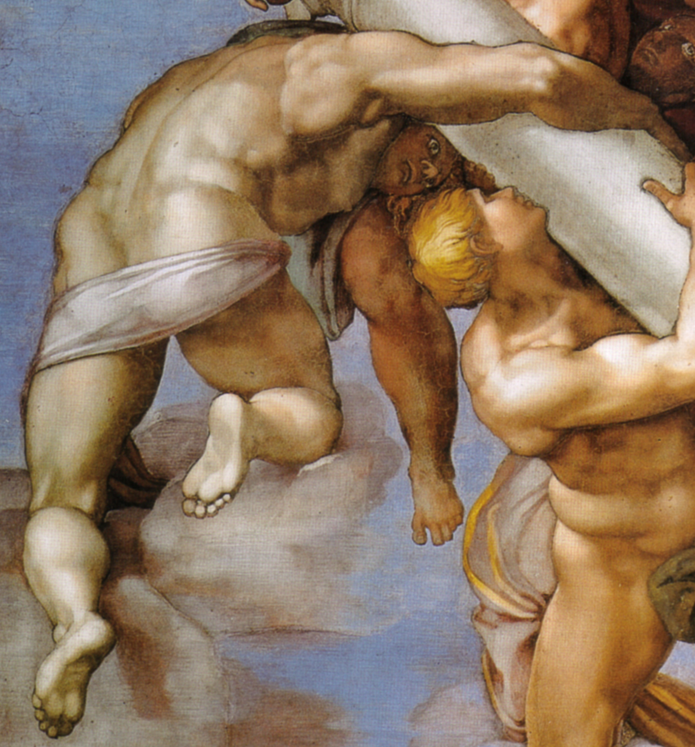 MICHELANGELO Buonarroti Last Judgment Fresco, 1370 x 1220 cm Cappella Sistina, Vatican